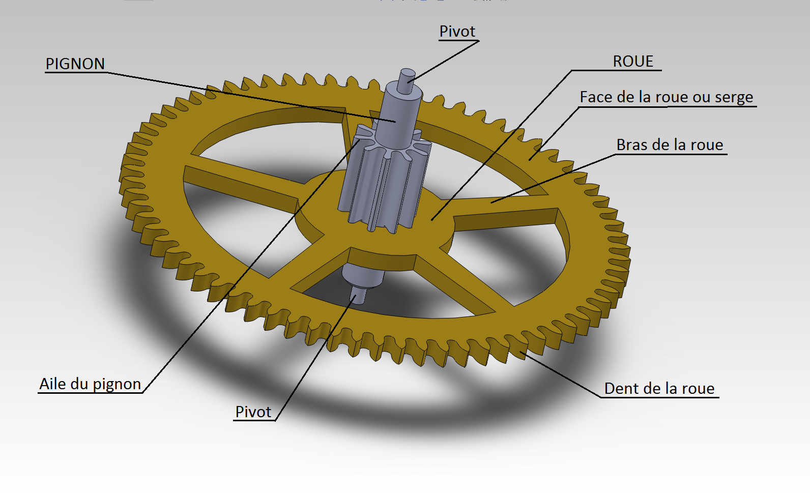 dessin d'une pièce horlogère